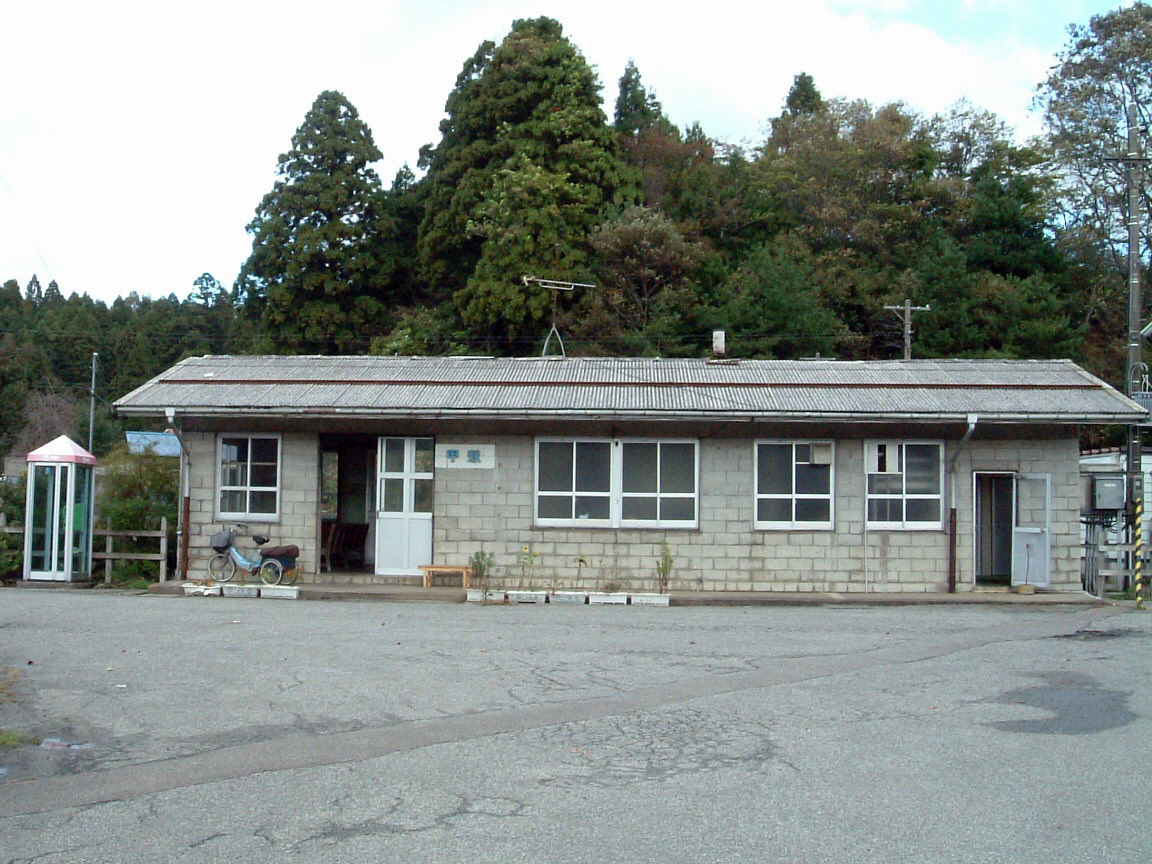 のと鉄道能登線甲駅